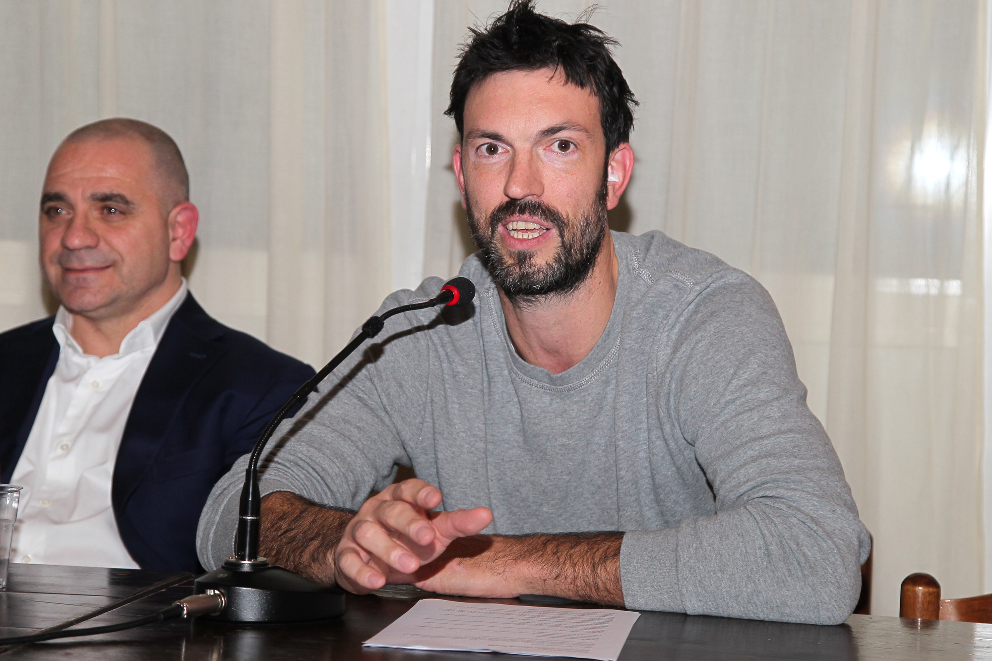 Immagine rilasciata dal proprietario della stessa, pallacanestro Varese